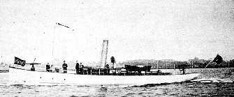 Armada Española, Cañonero de 3ª Clase Ligera